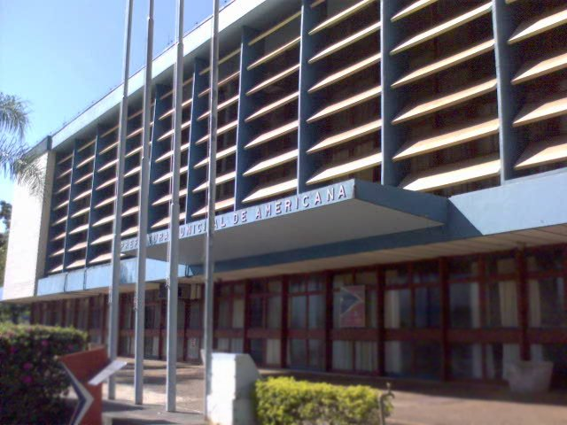 Prefeitura Municipal de Americana, São Paulo, Brasil